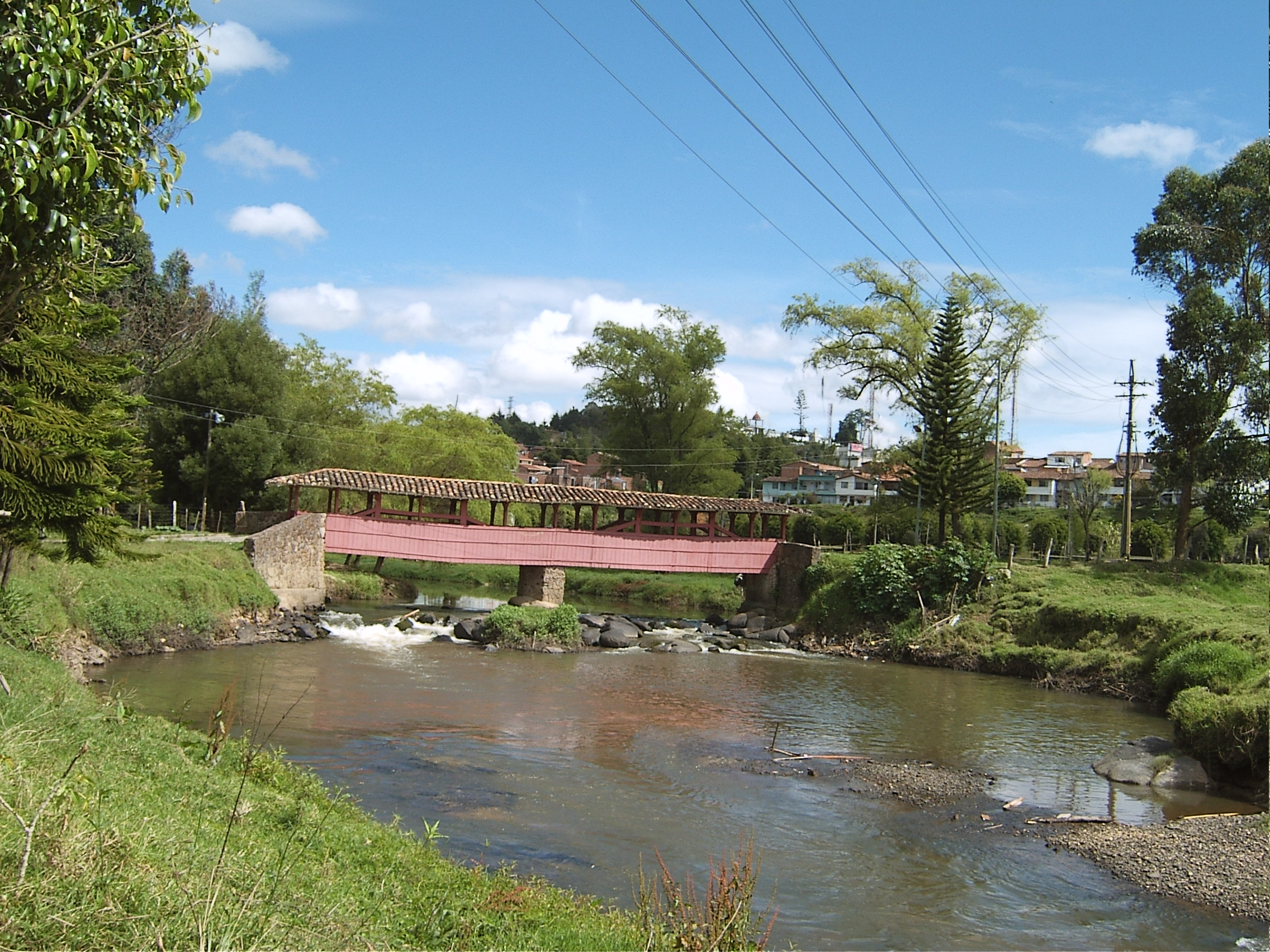 Puente Mejia construido en el siglo XIX, sobre el río negro. Rionegro, Antioquia, Colombia.